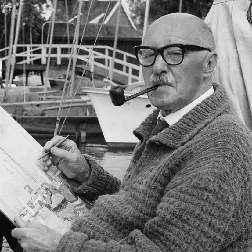 Bart Peizal 75 jaar (portretschilder) 1 augustus 1962